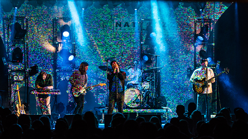 Bloody Beach, Nattjazz, 2014. Foto: Kristoffer Oen